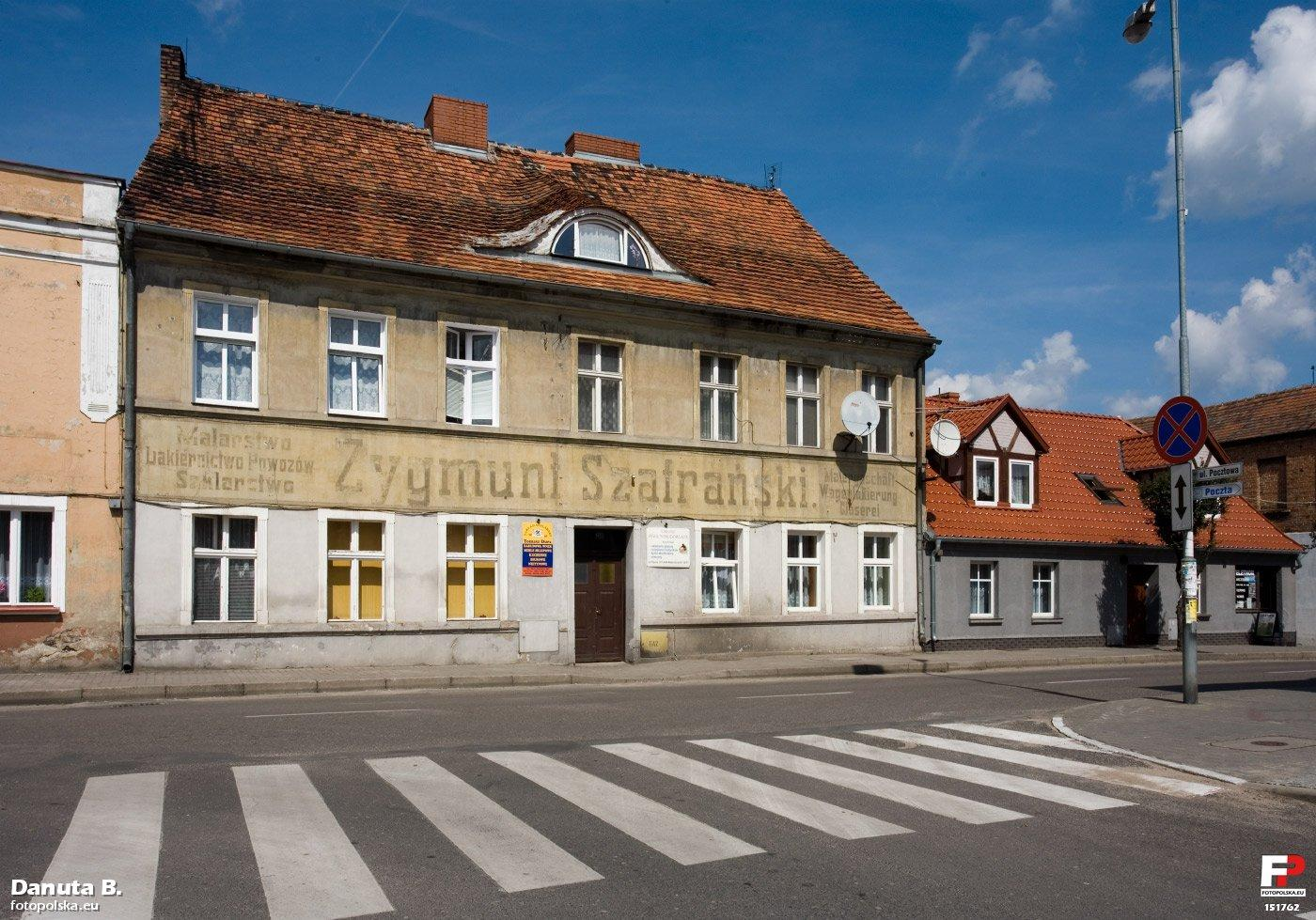 Wydaje się, że mieszkańcy kamienicy świadomie pozostawiają przedwojenny, dwujęzyczny szyld. Mam nadzieję, że nie zniknie pod kolejną warstwą farby.